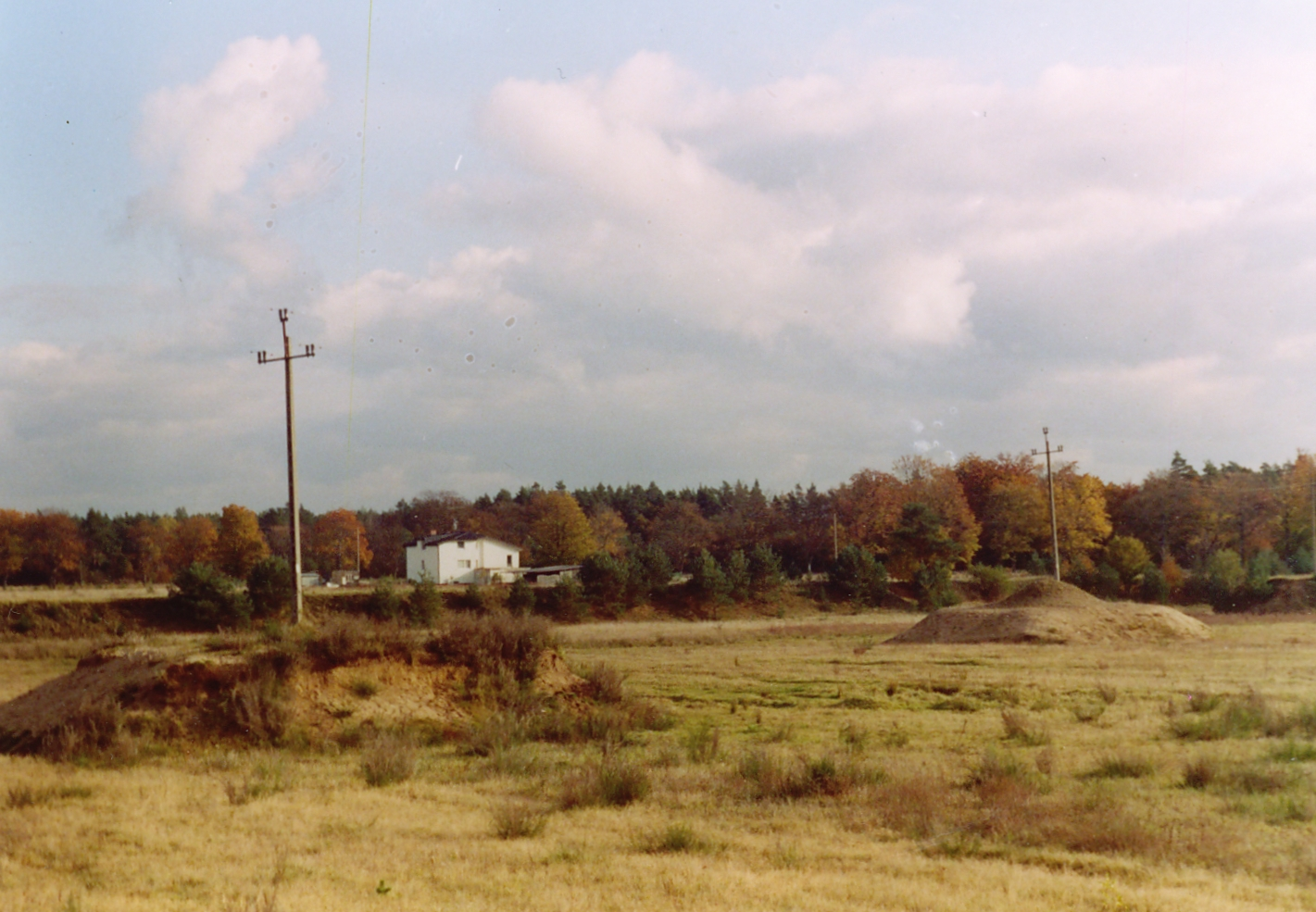 Mącznik- pow. słupski